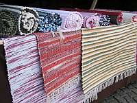 Ručně tkané koberečky